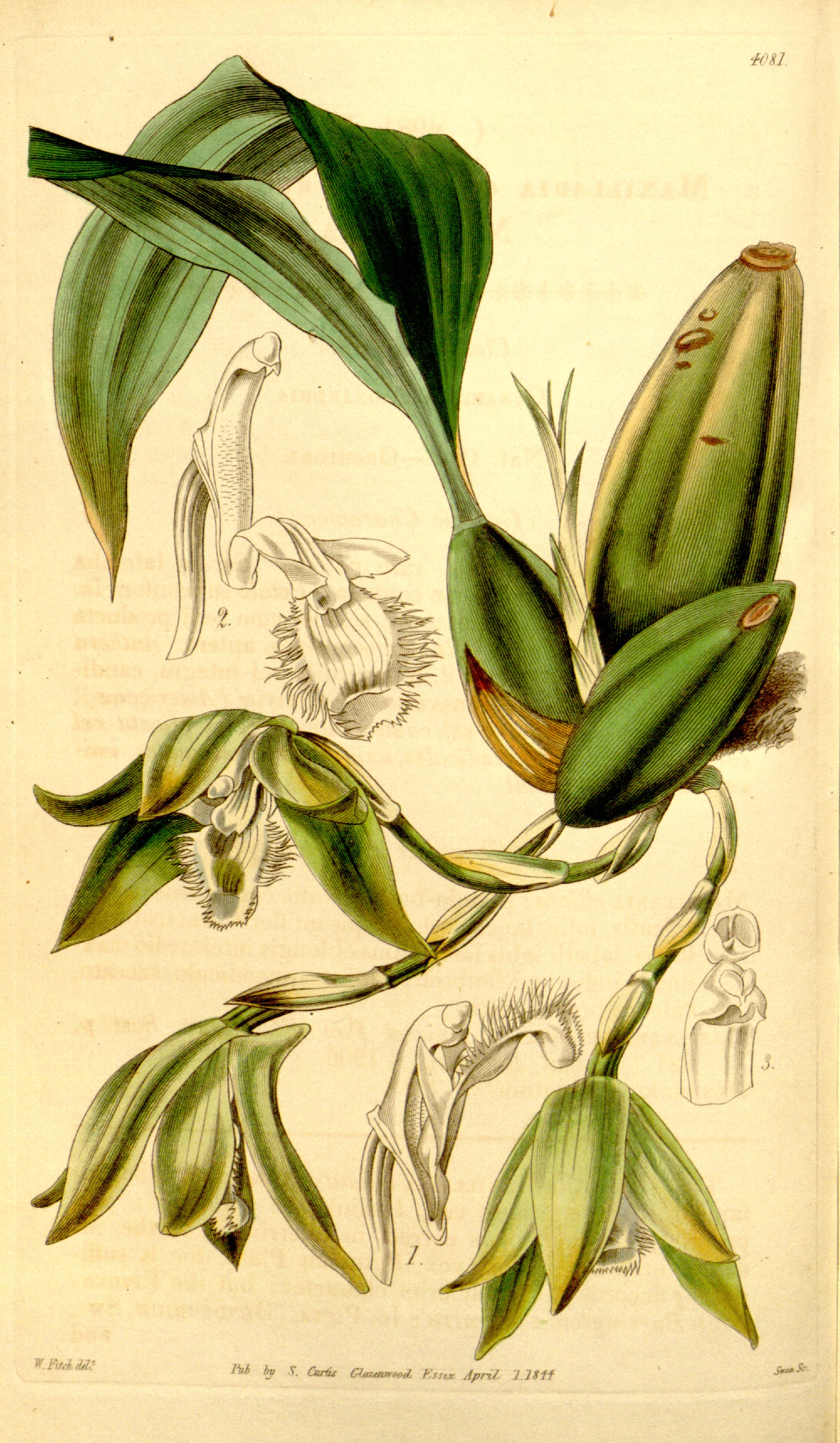 Illustration of Ida ciliata (Sudamerlycaste ciliata) (as syn. Maxillaria ciliata)